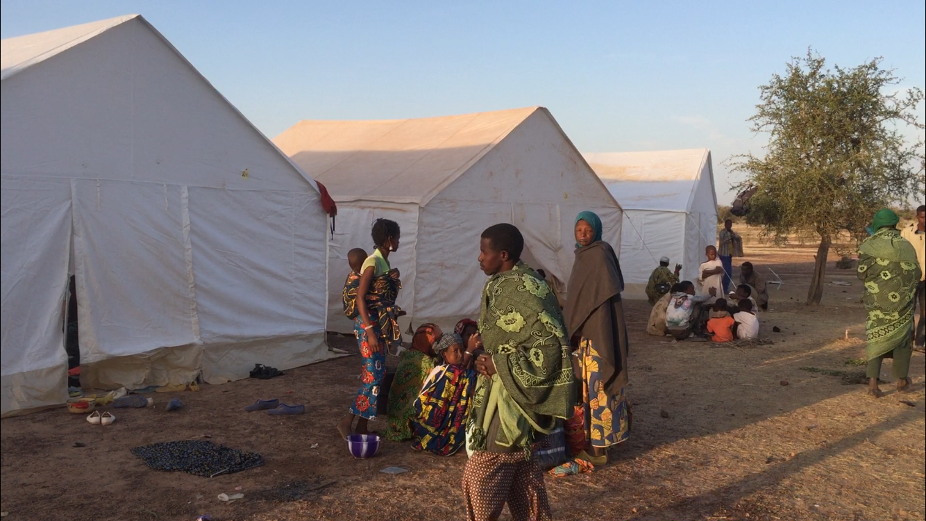 Au Burkina Faso, plus de 6.000 habitants de la région de Yirgou dans le centre-nord vivent désormais dans des camps de déplacés. A Barsalogho, à 65 km de Yirgou dans le Centre-Nord, une majorité de femmes et des enfants de l’ethnie peul sont les rescapés de la tuerie du 1er janvier qui a visé leur communauté lors de laquelle 49 personnes avaient été tuées. Des déplacés sur le site de Barsalogho au petit matin, au Burkina Faso, le 15 janvier 2019. (VOA/Lamine Traoré)